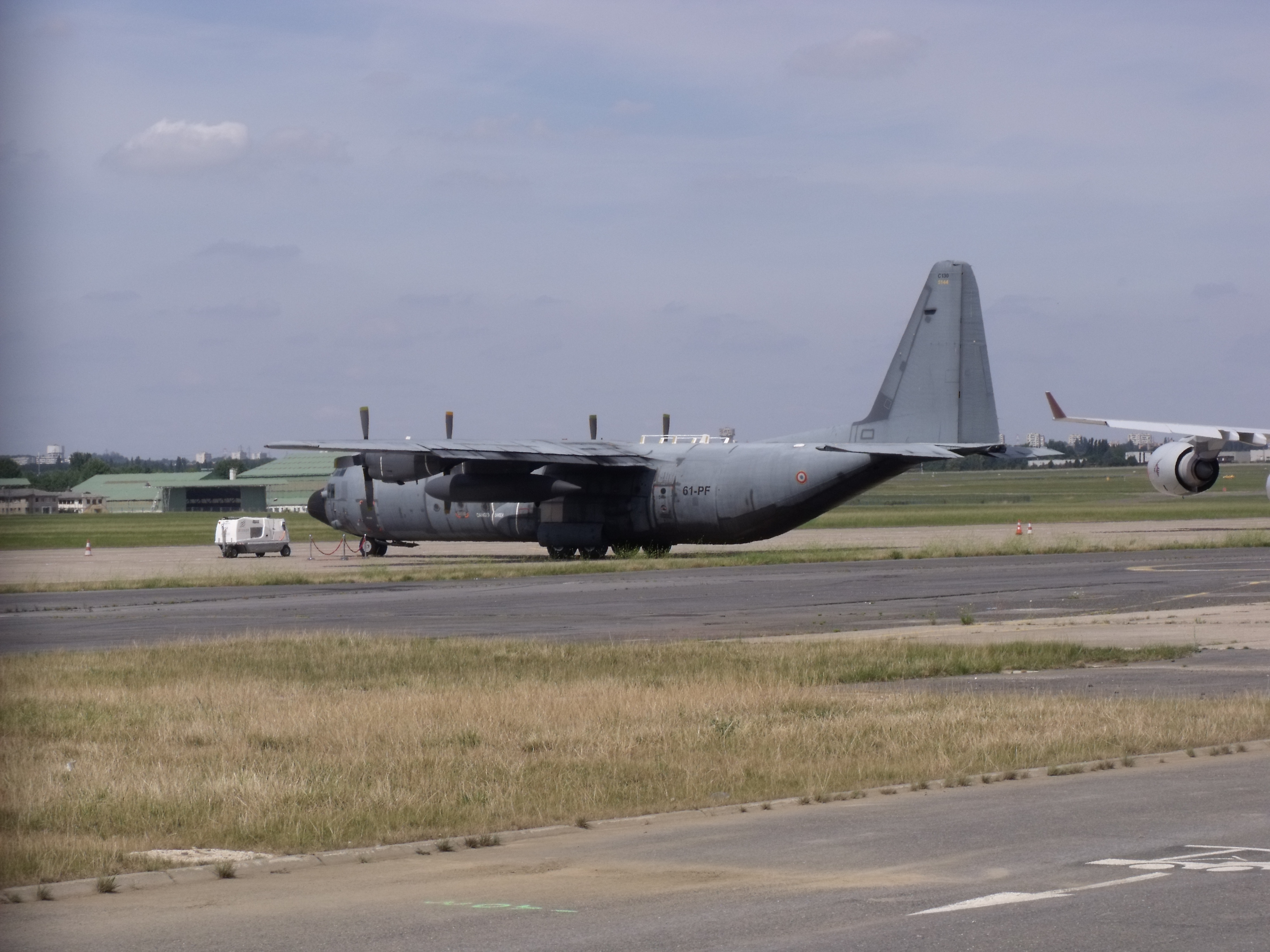 Vu le 22 août 2012 au Musée de l'Air et de l'Espace.